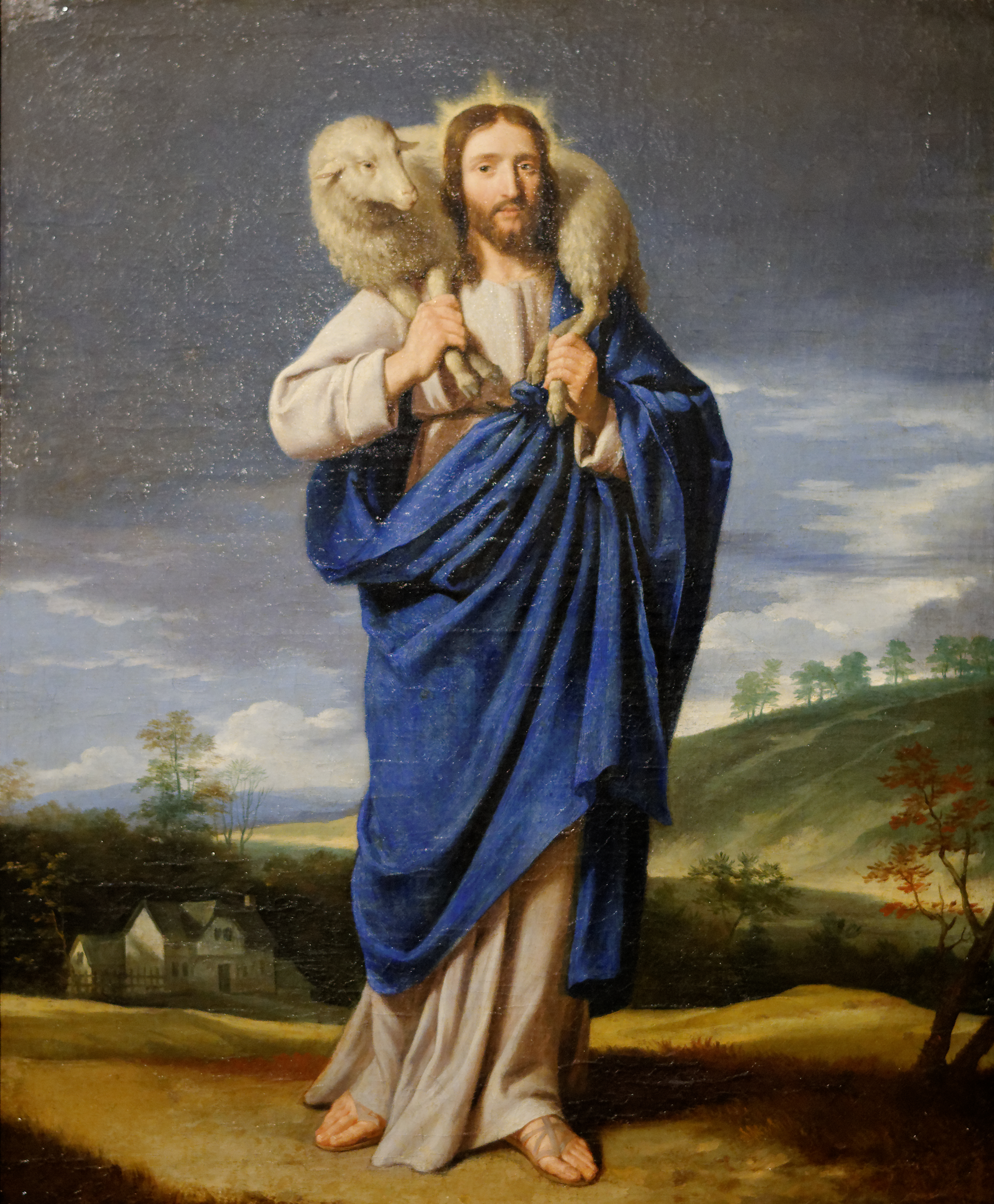 Le Bon Pasteur. Acquis en 1883. Inv A.96